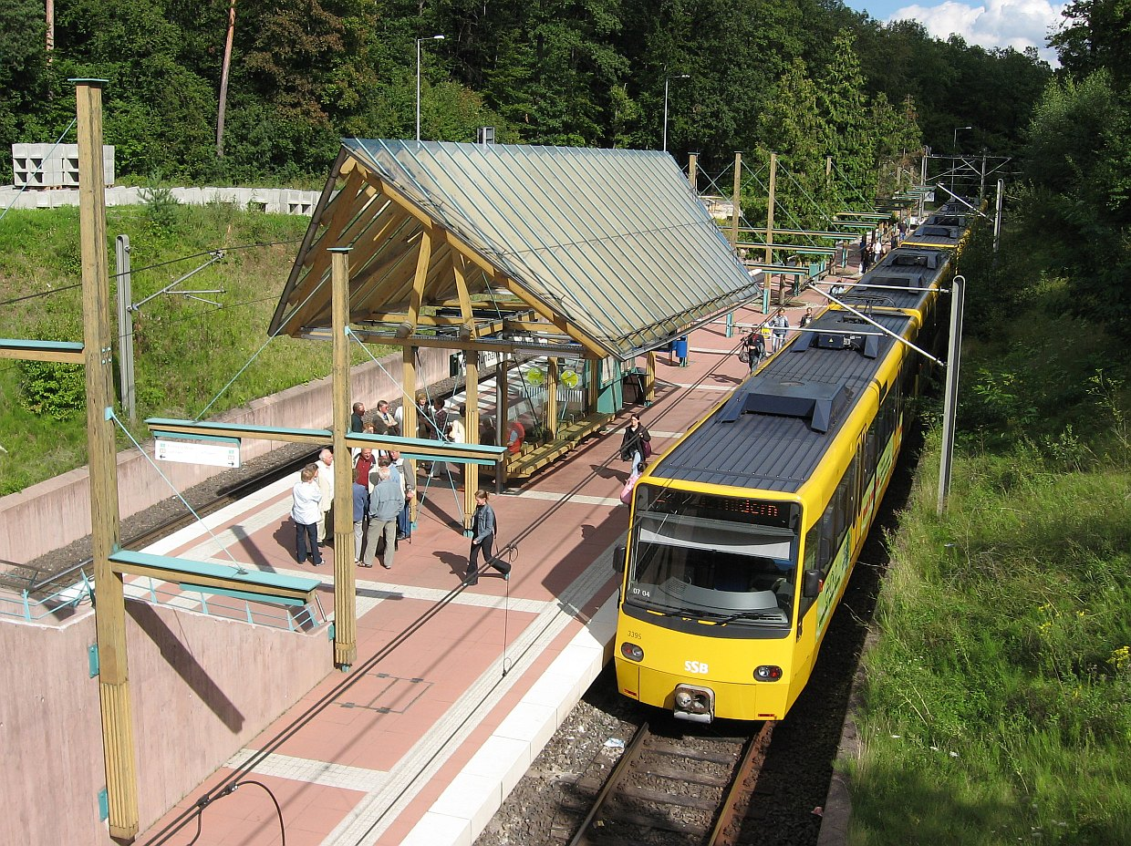 Haltestelle Ruhbank der Stuttgarter Stadtbahn (September 2006) eigenes Foto / alle Rechte freigegeben